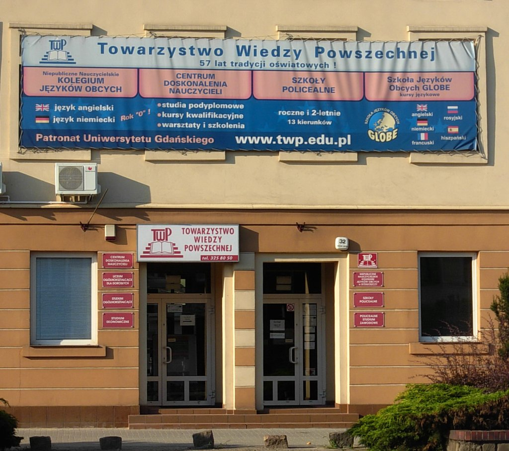 Budynek ul. Grunwaldzka 32, w którym mieści się bydgoski oddział Towarzystwa Wiedzy Powszechnej